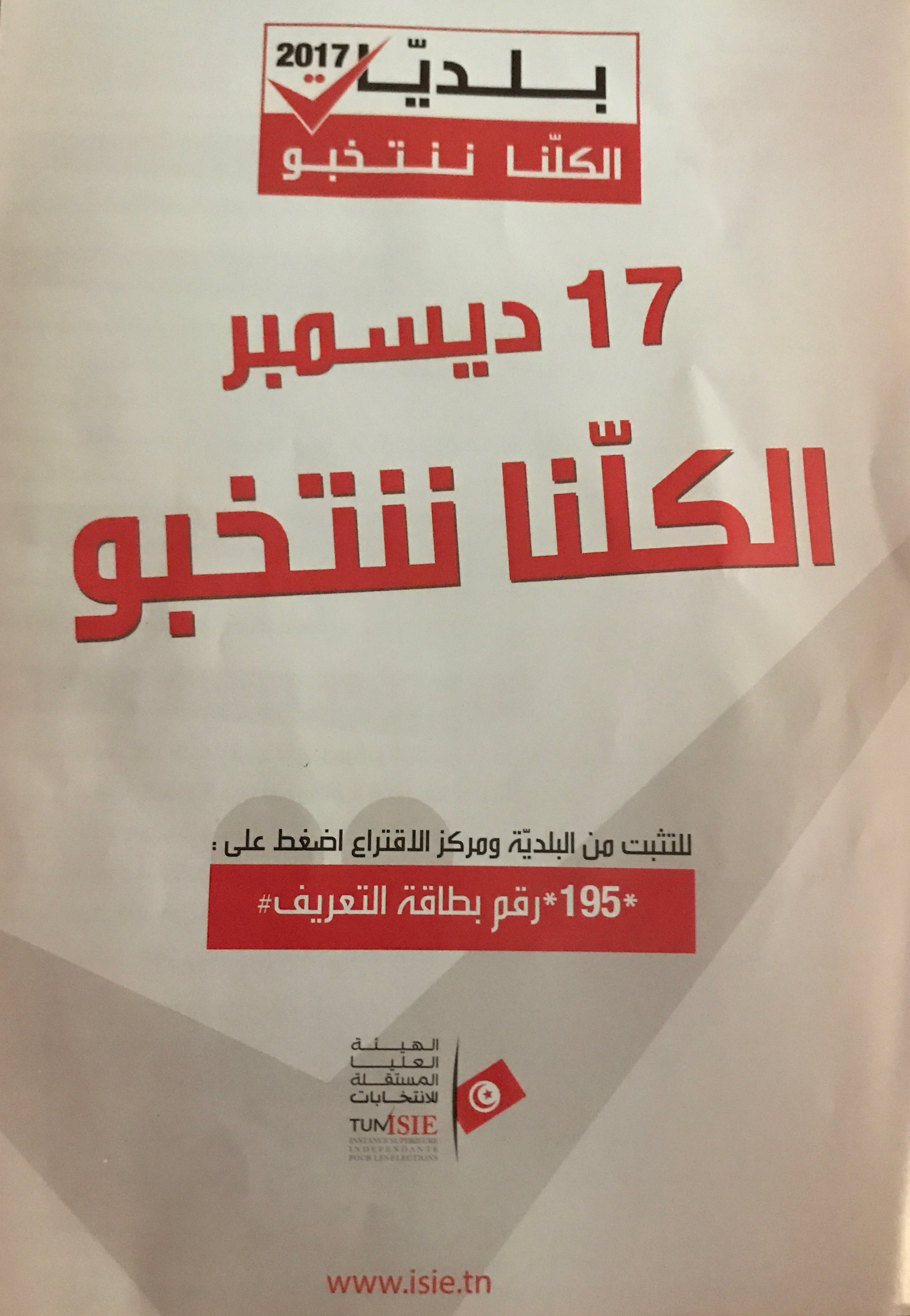 Affiche ISIE élections municipales 2017 en Tunisie.